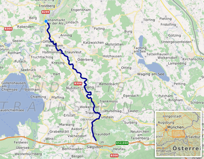 carte réalisée sur umap